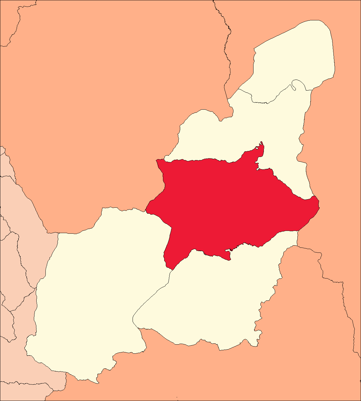 Área del distrito de Puerto Inca.